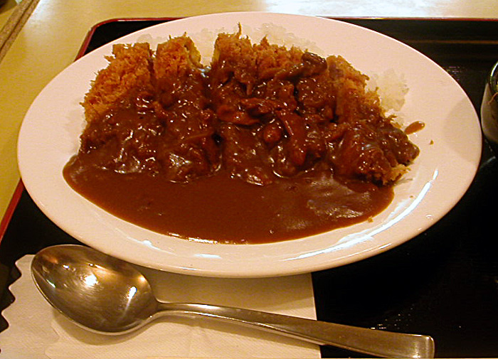 撮影者：小太刀 カツカレー